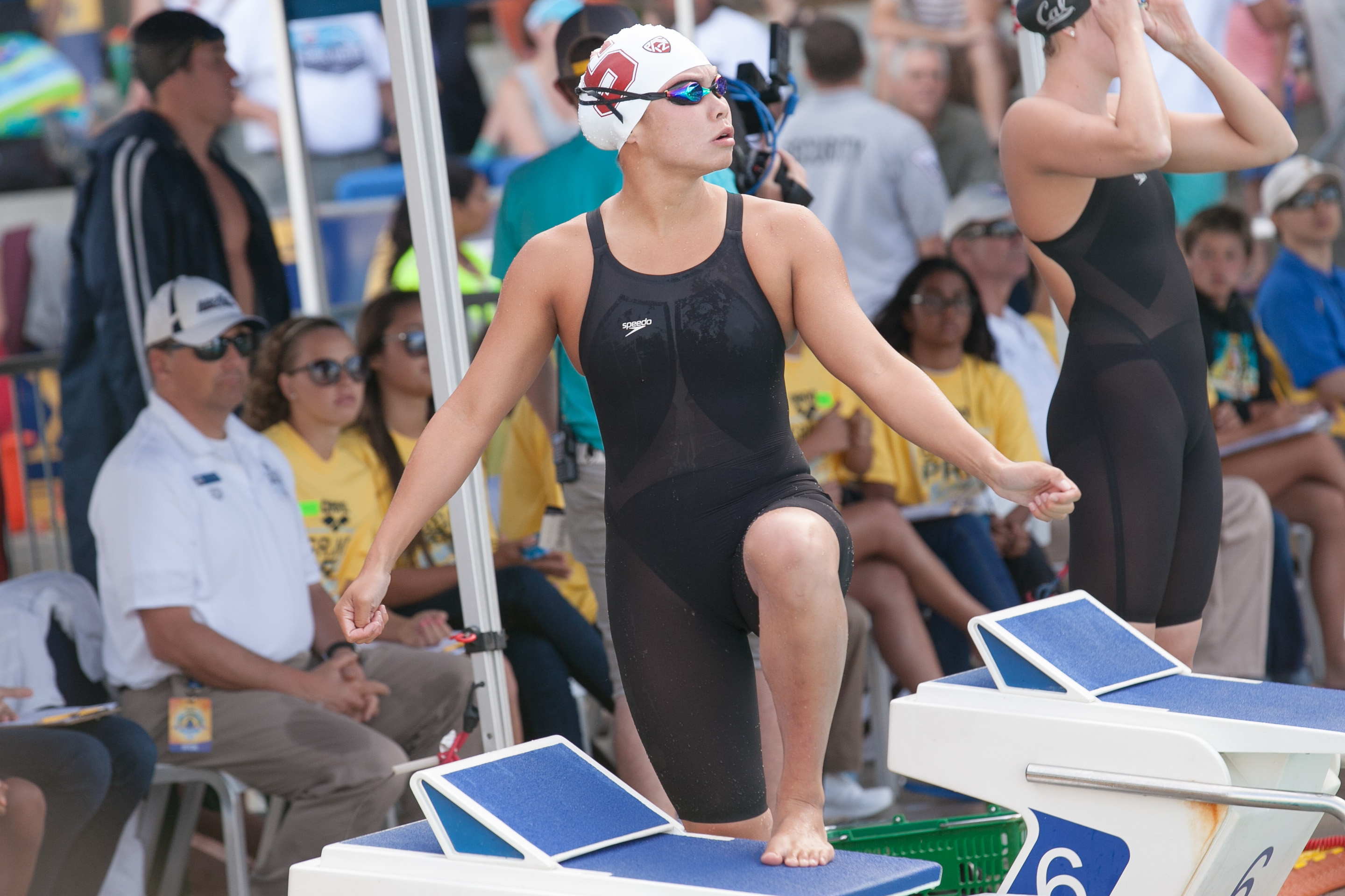 Felicia Lee